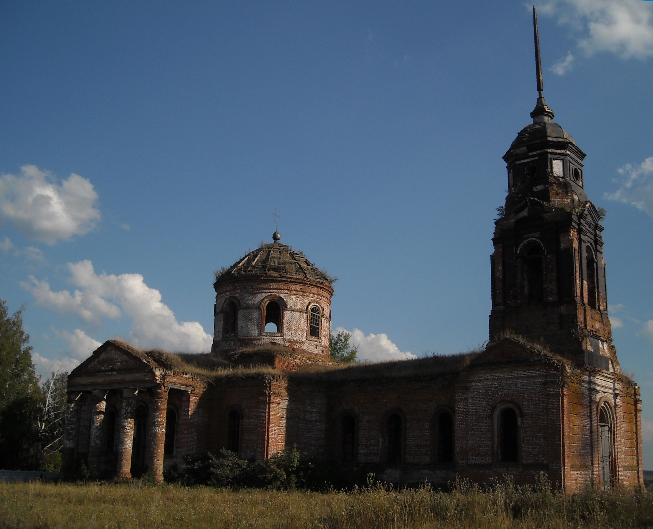 Заброшенная Никольская церковь в селе Лещино-Плата (Гололобовка), Солнцевский р-н Курской области